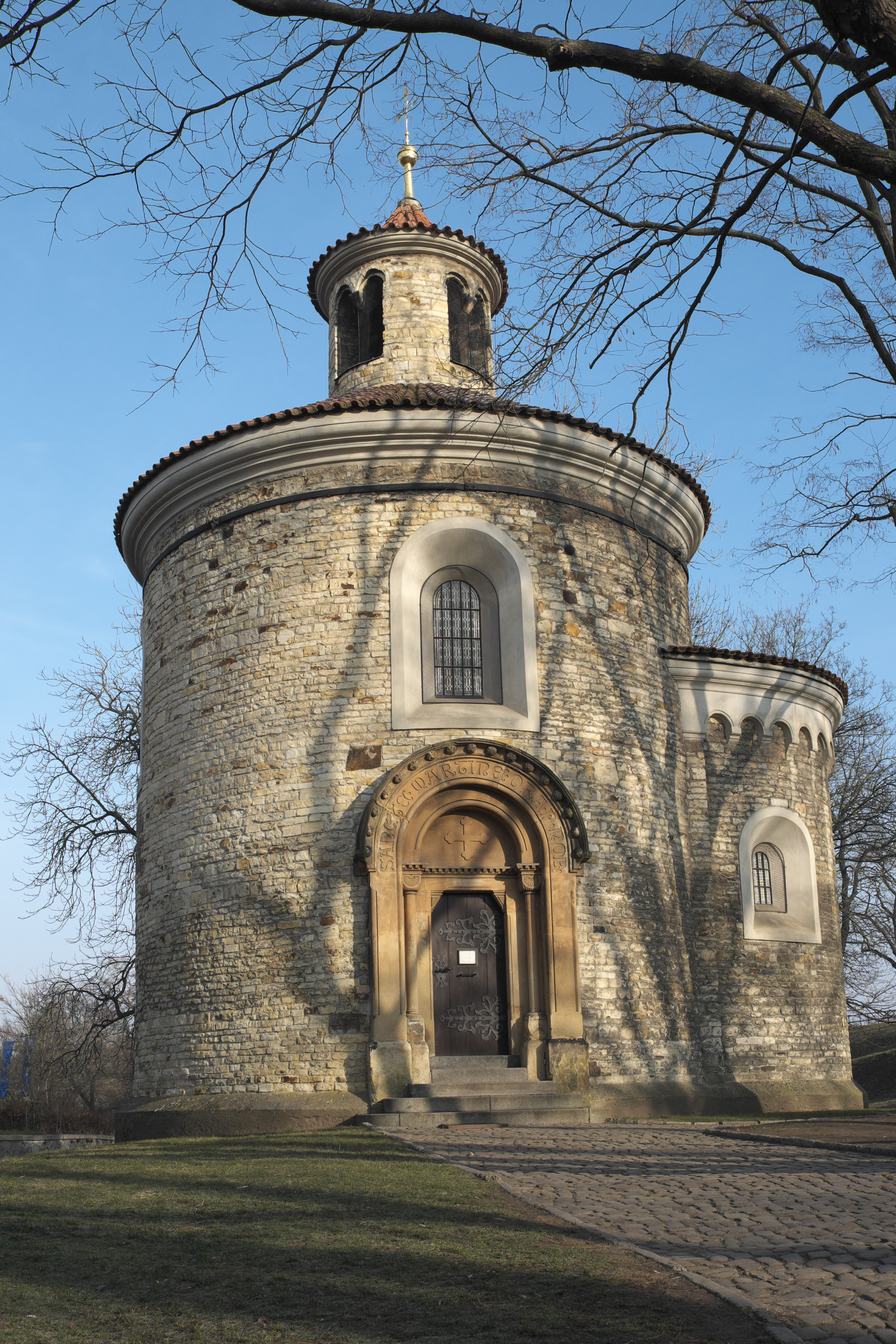 Martinsrotunde auf dem Vyšehrad in Prag (Tschechien)